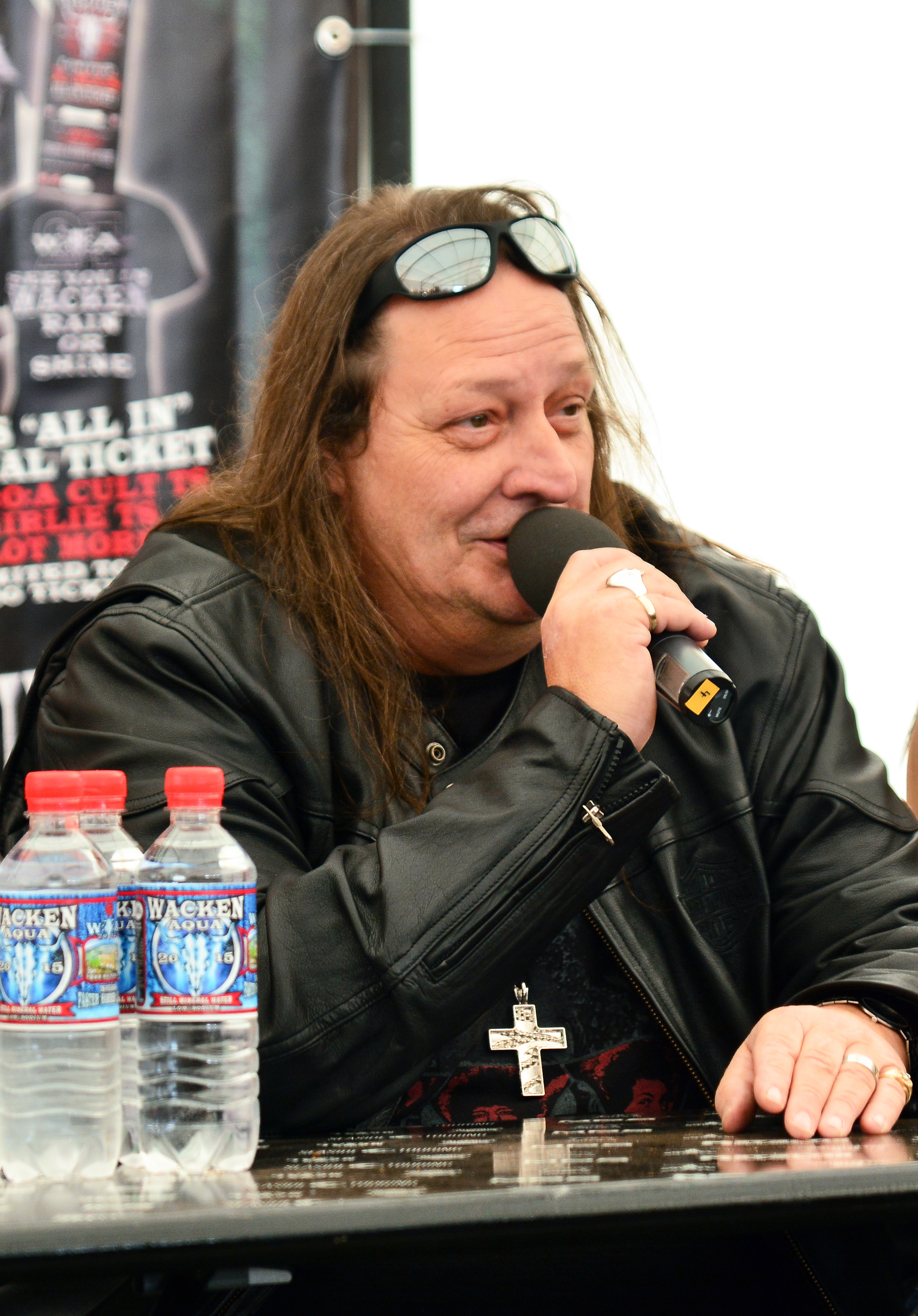 Jon Oliva von Savatage bei einer Pressekonferenz während des Wacken Open Air 2015